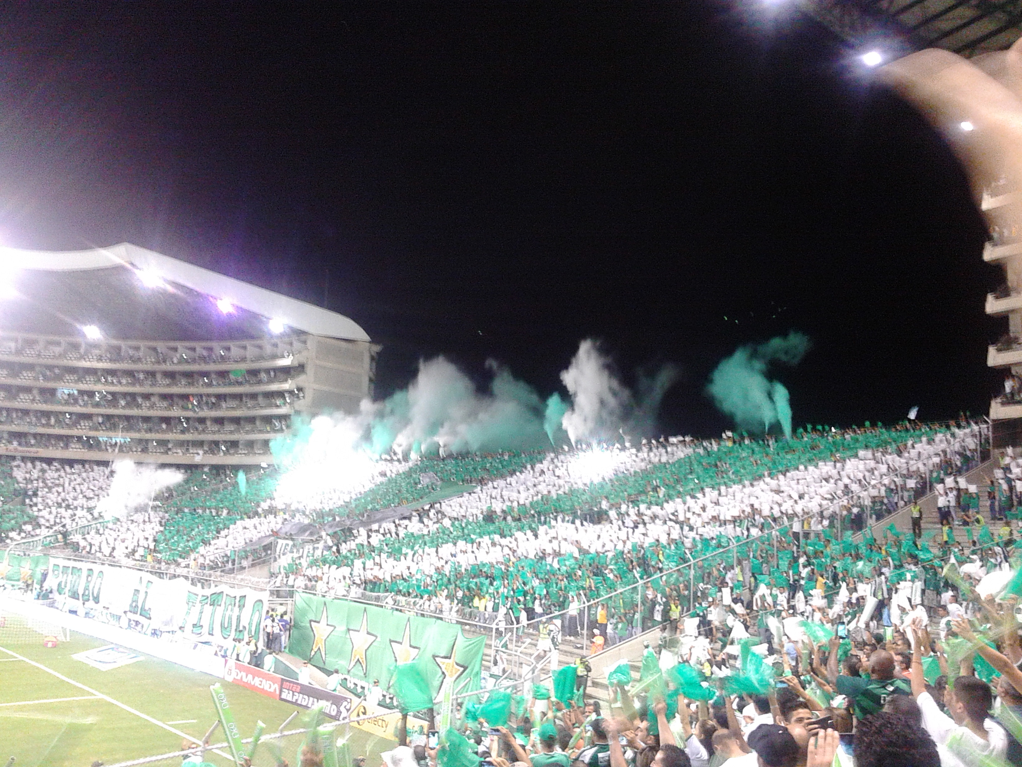 Segundo encuentro de la semifinal entre Deportivo Cali y Millonarios, que se saldó con un 1-0 a favor de los locales, y en penales 4-3 a favor de loo azucareros, que clasificaron a la final.